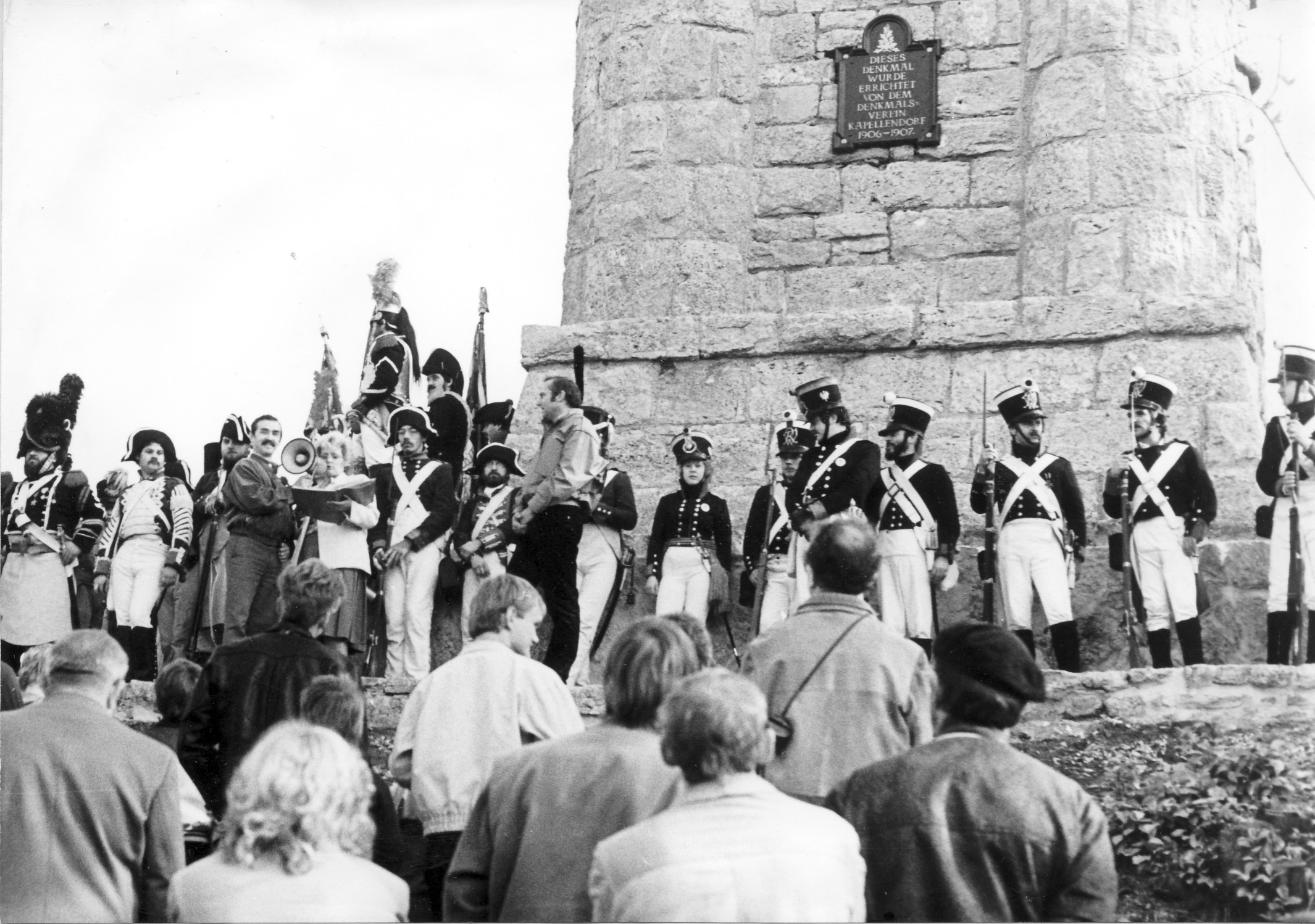 Begrüßung der Gäste des 180jährigen Gedenkens am Turm auf dem Sperlingsberg